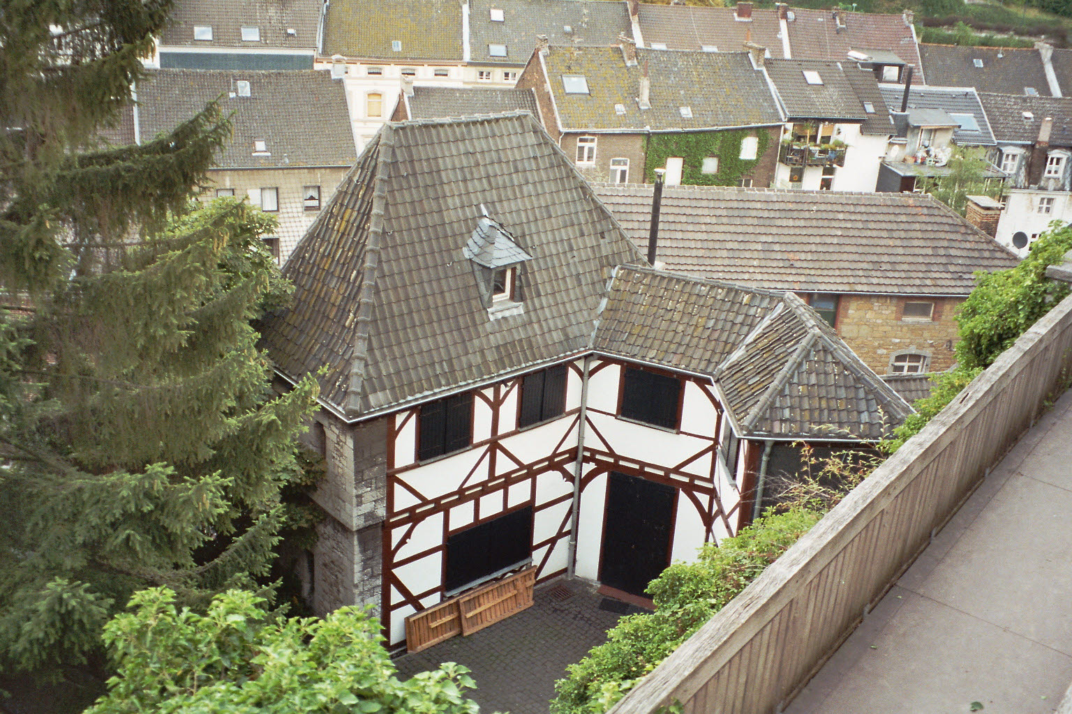 Burghaus der Burg Stolberg